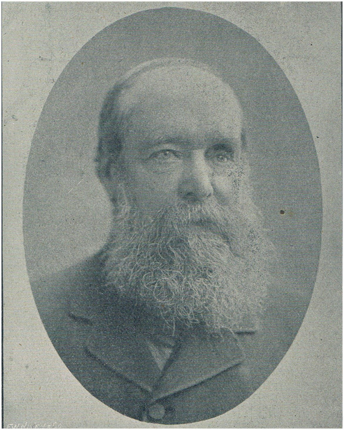 Anthony O'Grady Lefroy